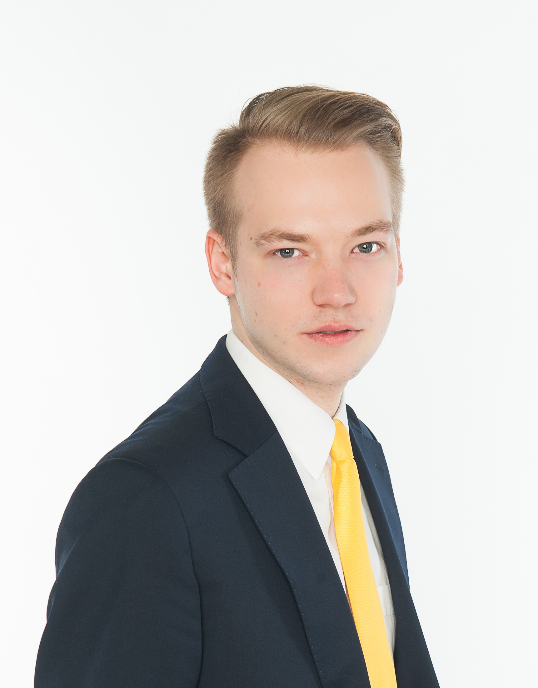 Jānis Junkurs